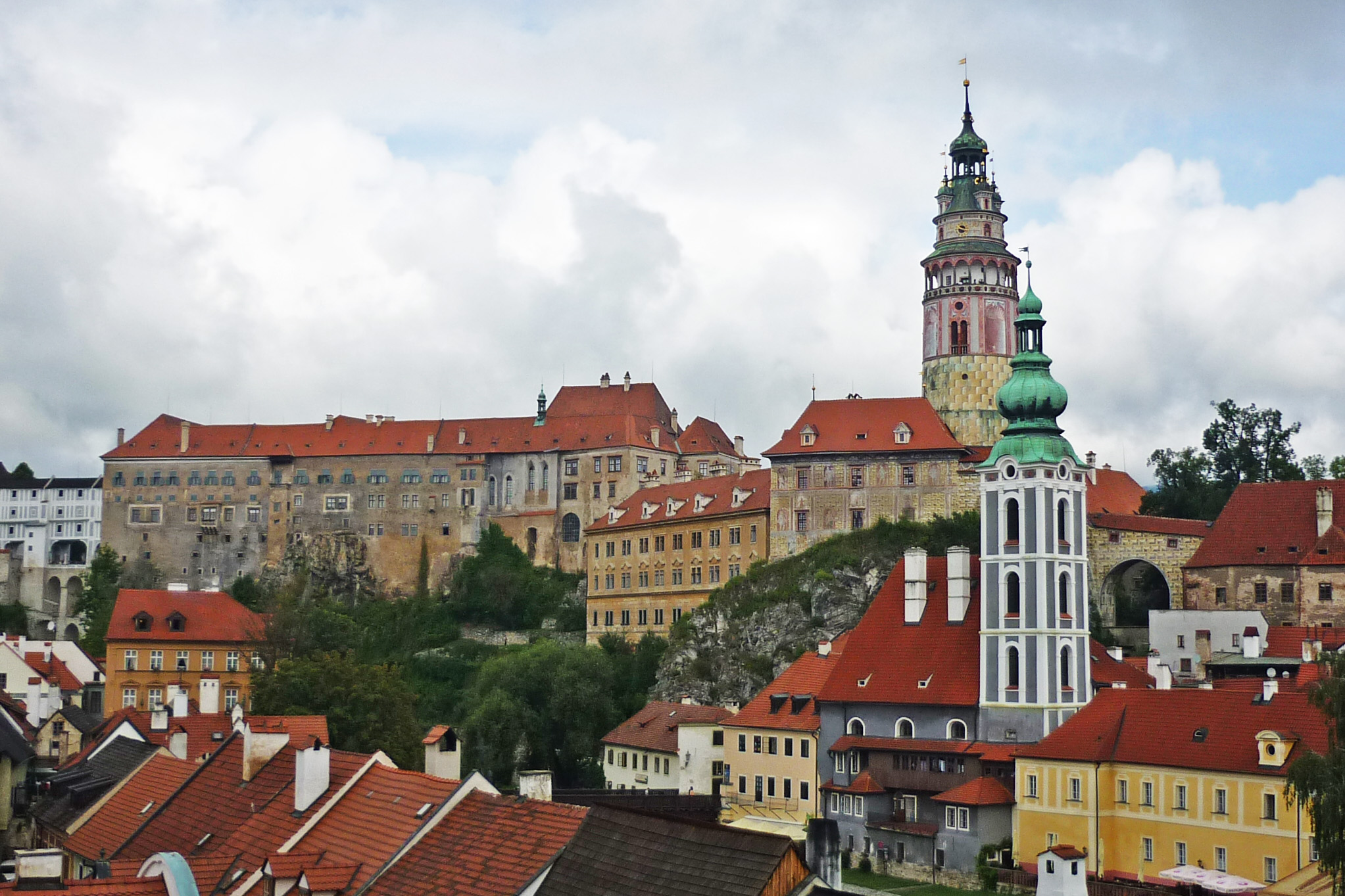 Blick auf Böhmisch-Krumau / Český Krumlov